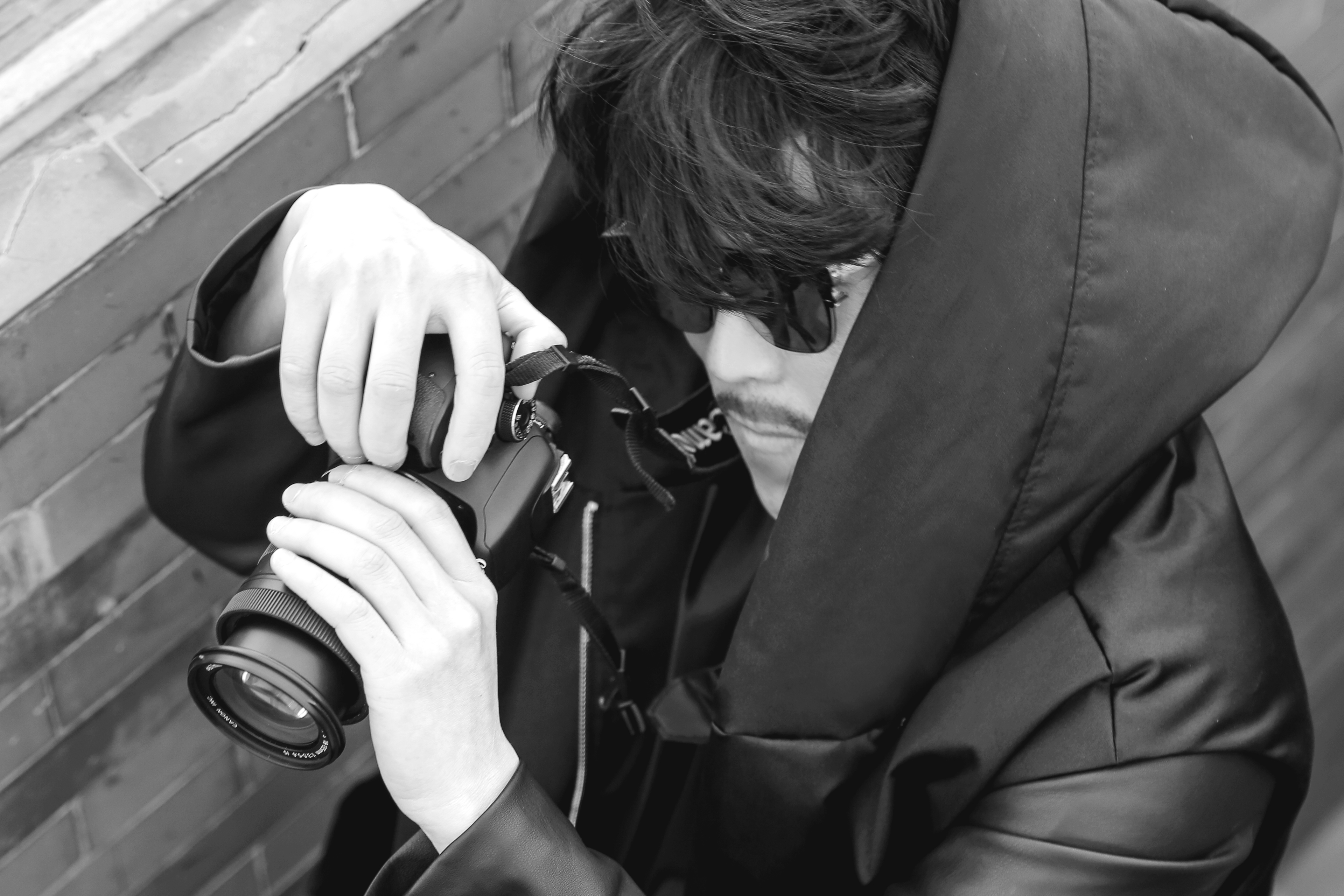 中文（台灣）: 范景翔演出照片